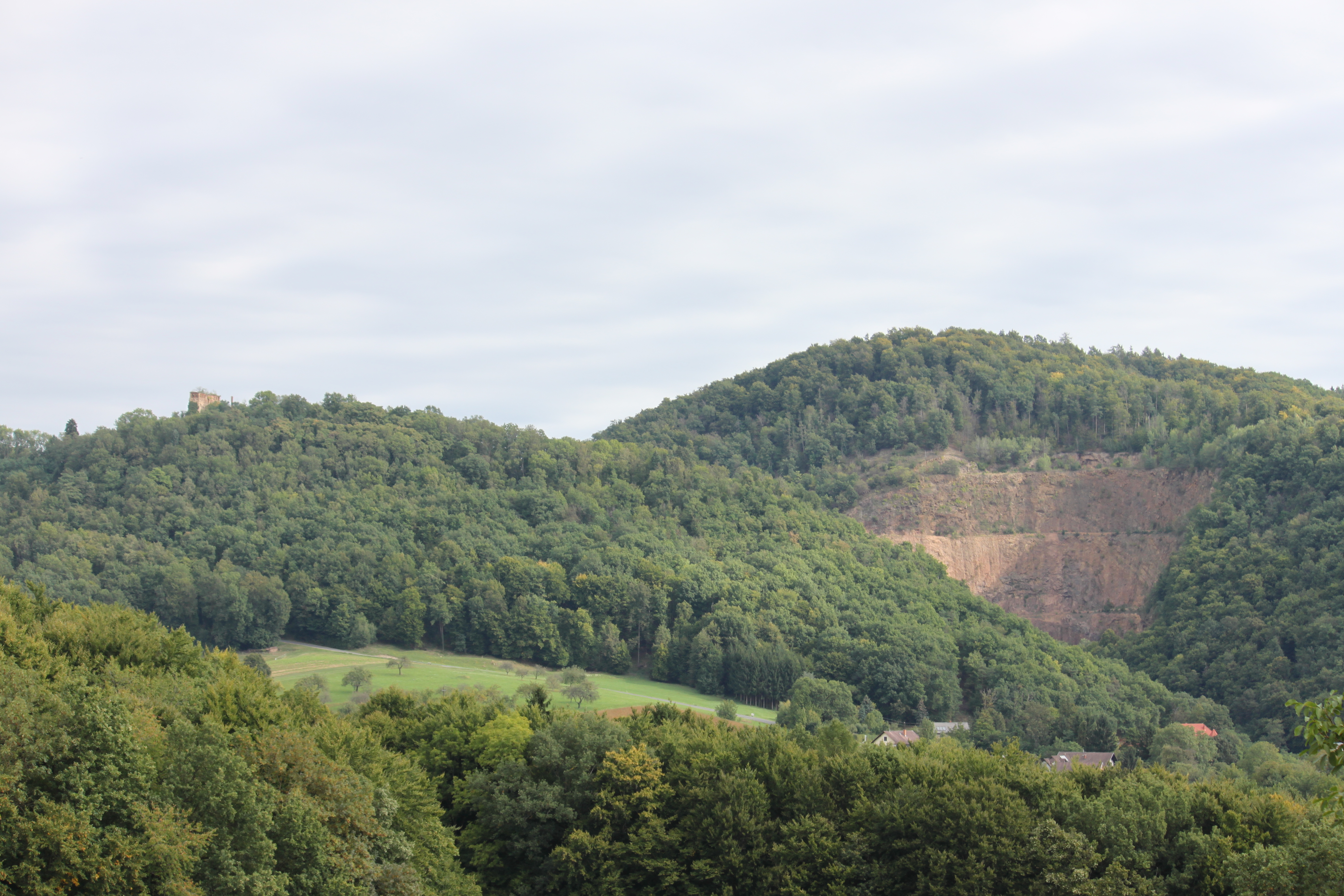 Steinbruch Klausen, Bad Gleichenberg, links auf dem gegenüberliegenden Hügel ist die Burgruine Neu-Gleichenberg erkennbar, im Tal dazwischen fließt der Klausenbach, über dem Steinbruch Klausen stand ehedem die Burg Alt-Gleichenberg, der ehemalige Standort der Burg Alt-Gleichenberg ist heute ein Naturschutzgebiet mit einer Reliktfauna, siehe: NSG-c80 Trockenbiotop am Steinbruch "Klausen"